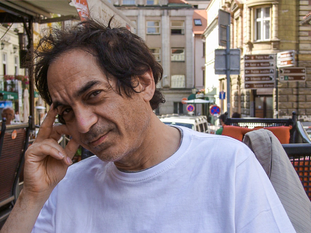 Daniel Ichbiah en 2007